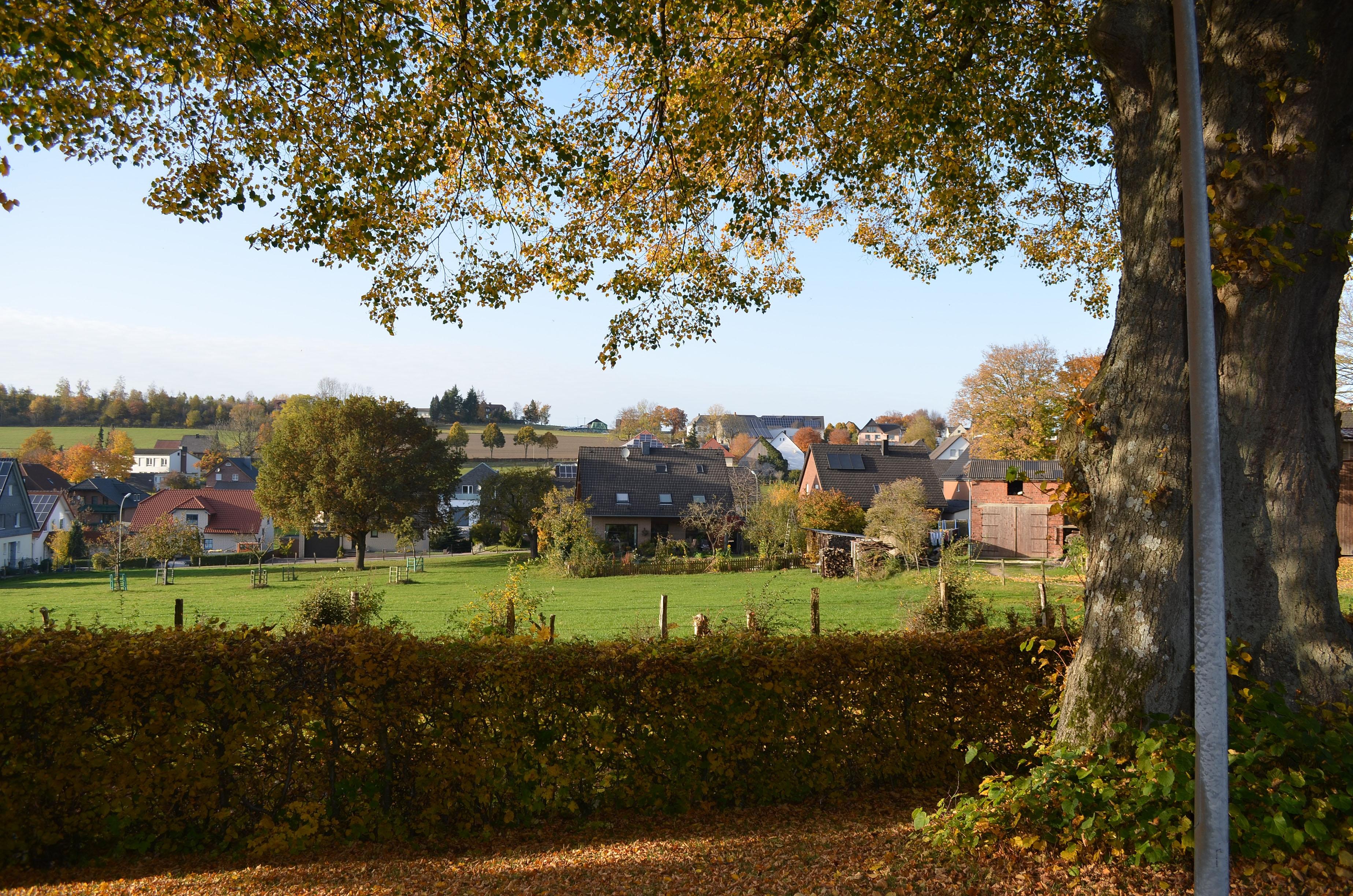 Brilon, Wülfte, Ortsansicht 6